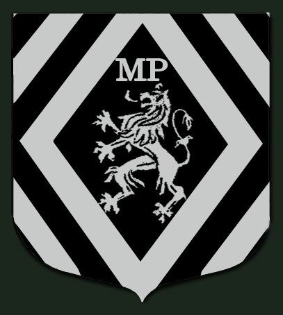 Ecusson des Milices patriotiques - mouvement de la résistance belge durant la WWII